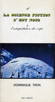 livre publié à Paris par Eric Losfeld.